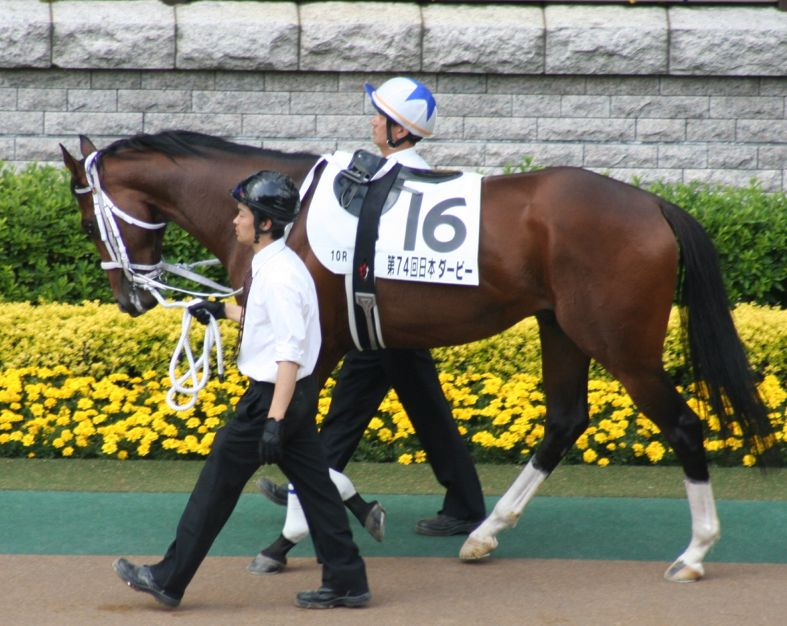 Asakusa Kings